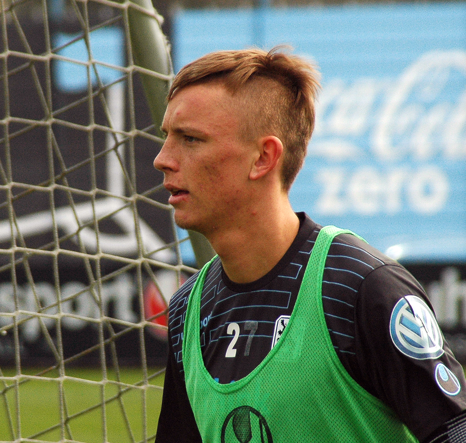 Marius Wolf, 2015